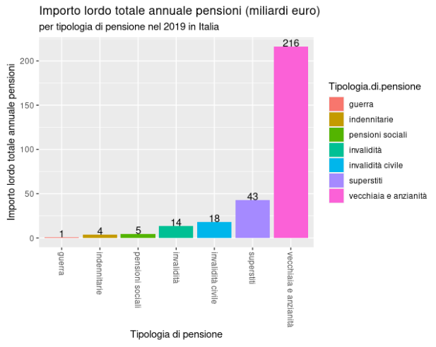 File realizzato con RStudio usando dati Istat